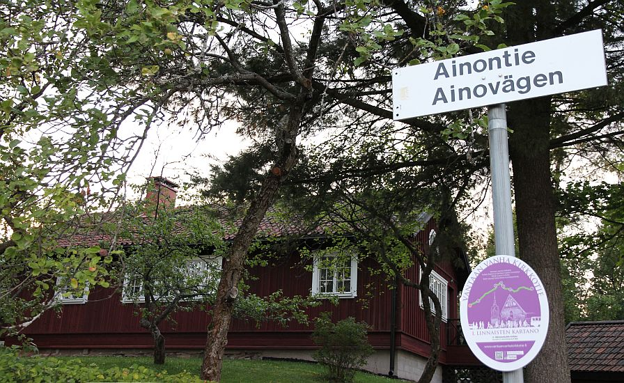 Linnaisten kartanoalueen opastekyltti ja hitu kartanoaluetta Vantaalla. Huom: Muista säilyttää viittaus kuvaajaan, mikäli käytät kuvaa.